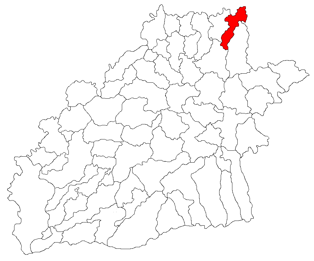 Categorie:Hărţi ale judeţului Sibiu